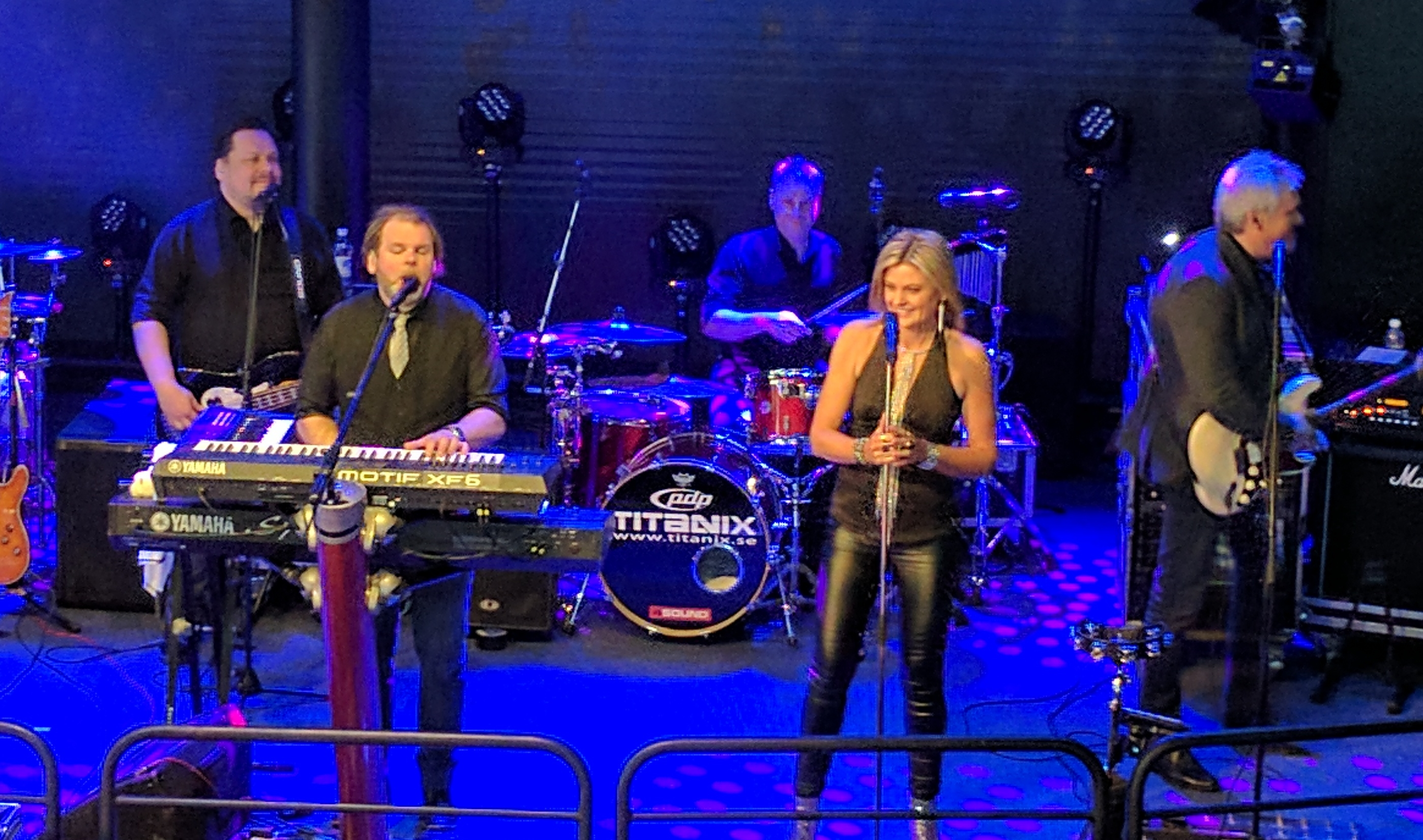 Titanix på Cinderella